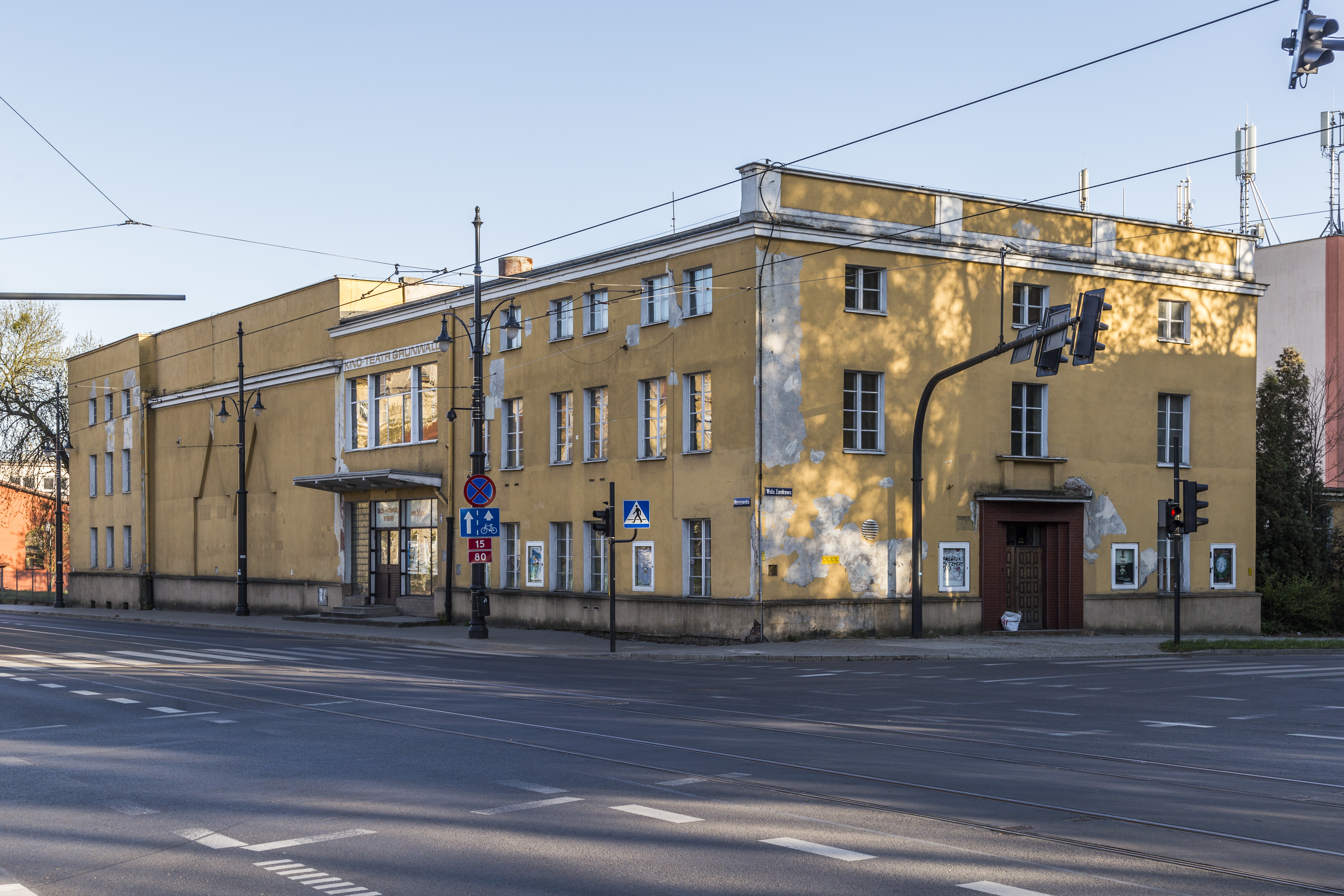 Toruń, ul. Warszawska 11, dawny Dom Żołnierza, później kino Grunwald, obecnie w trakcie adaptacji na Kujawsko-Pomorski Teatr Muzyczny.